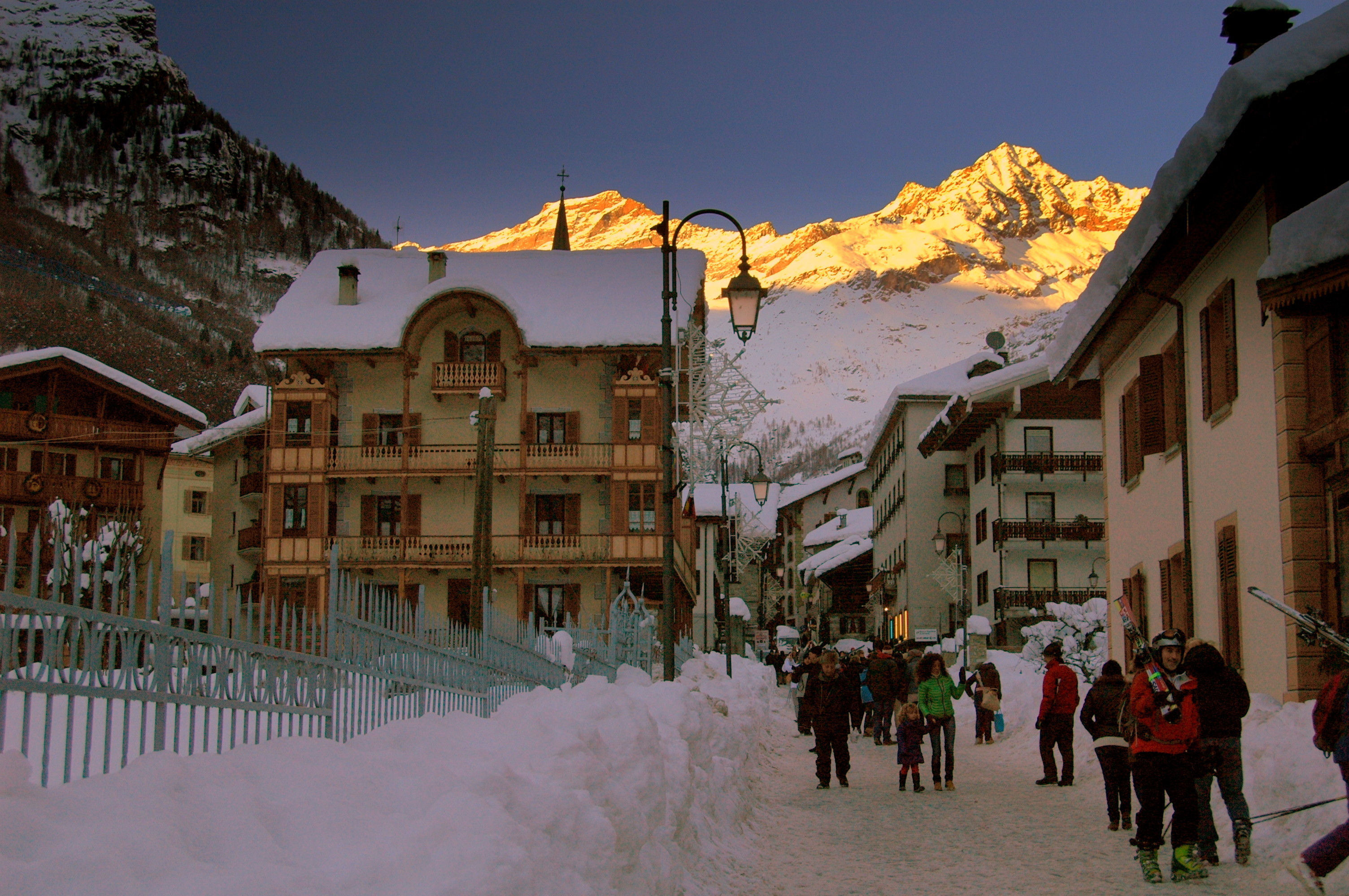 Alagna Valsesia, Monte Rosa, Via dei Walser